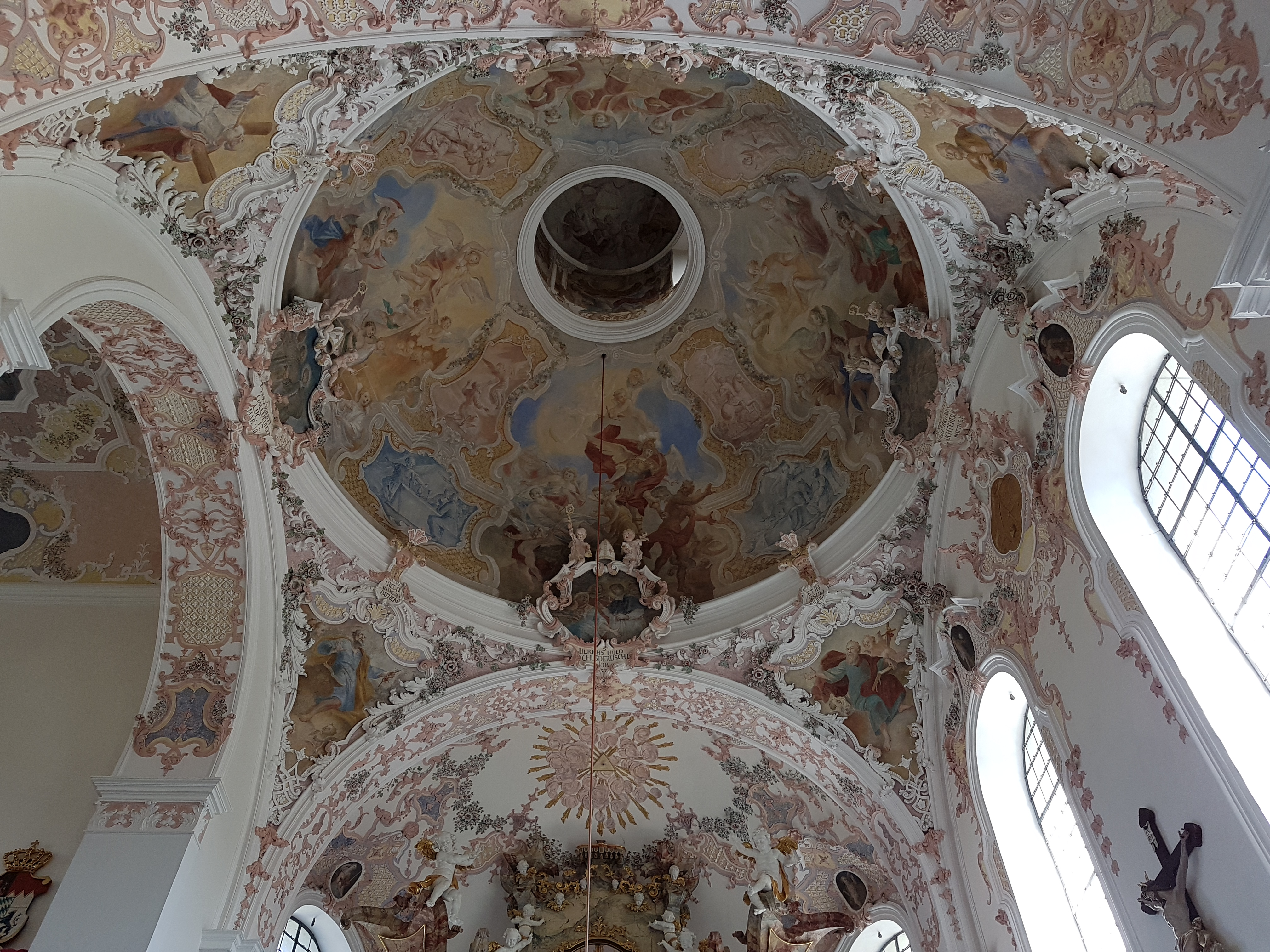 Sankt Michael (Bertoldshofen)